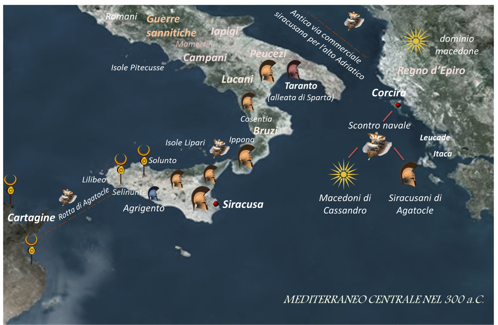 Mediterraneo centrale 300 a.C. - epoca di Agatocle